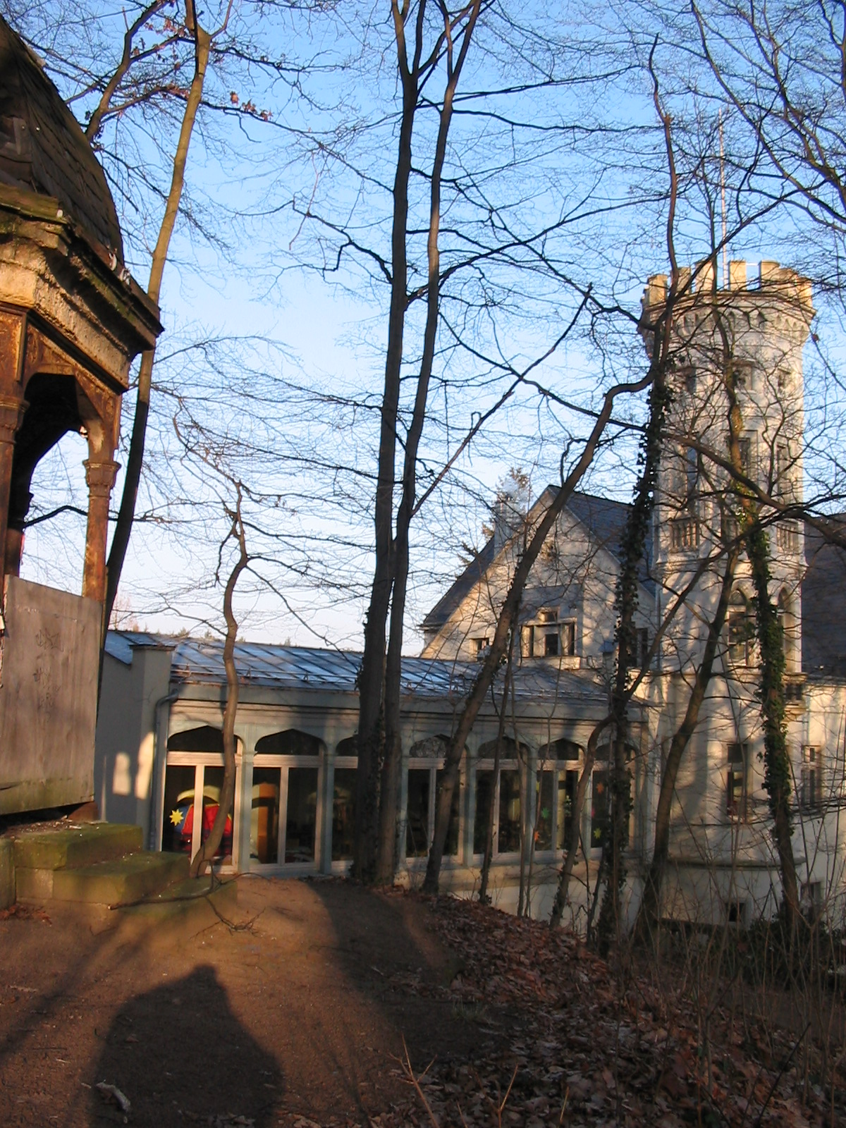 Radebeul Mohrenhaus